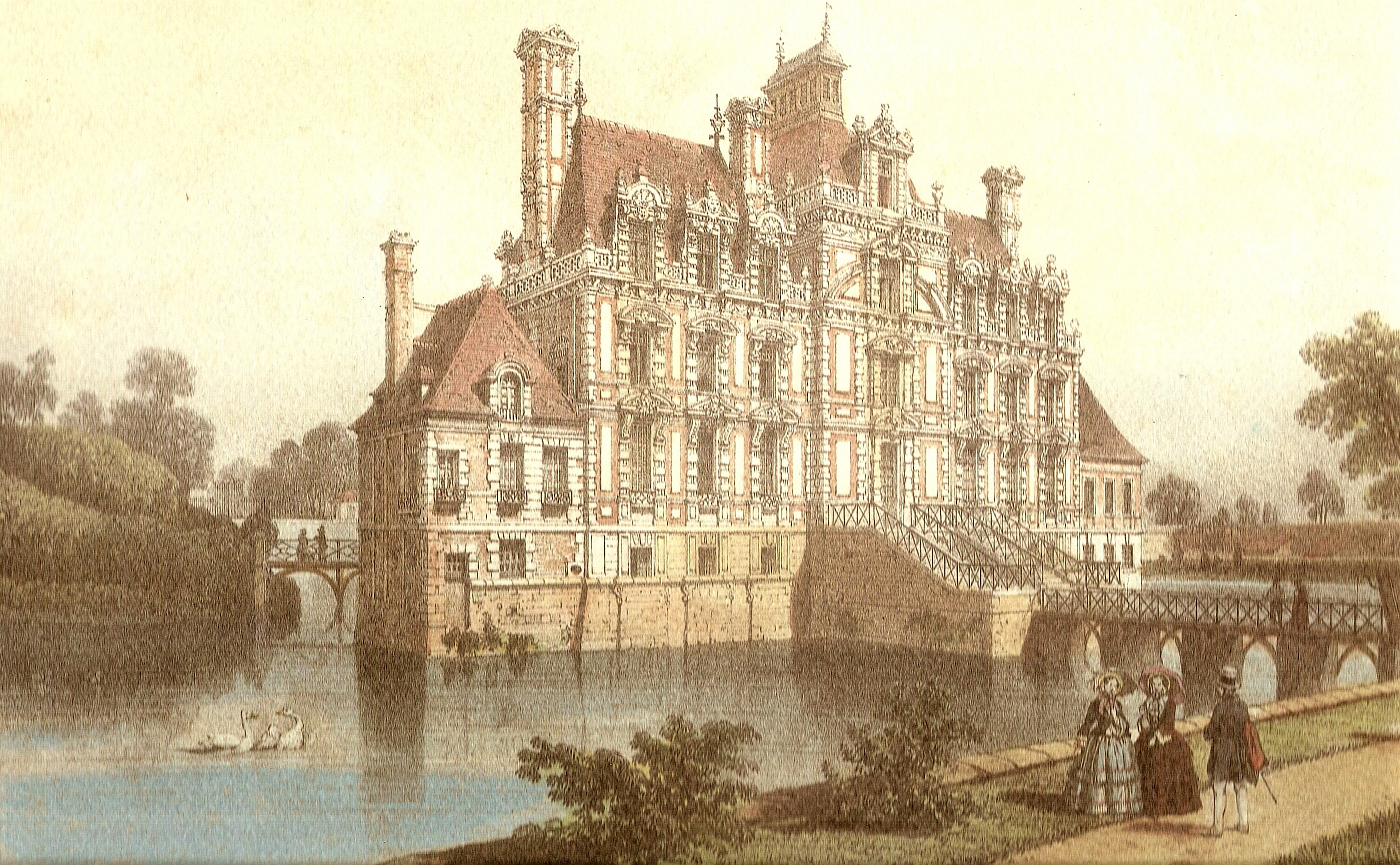 Schloss Beaumesnil, colorierte Zeichnung